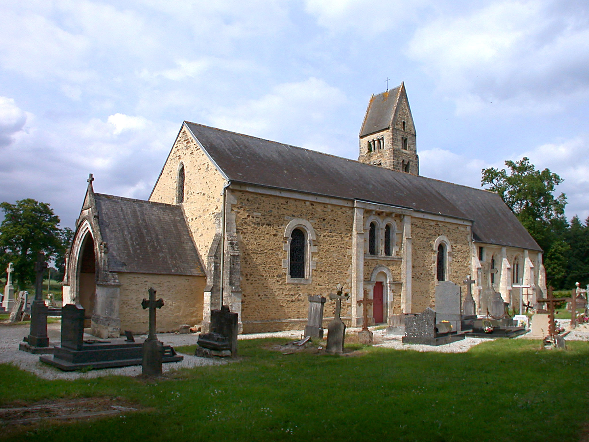 Livry (Calvados)